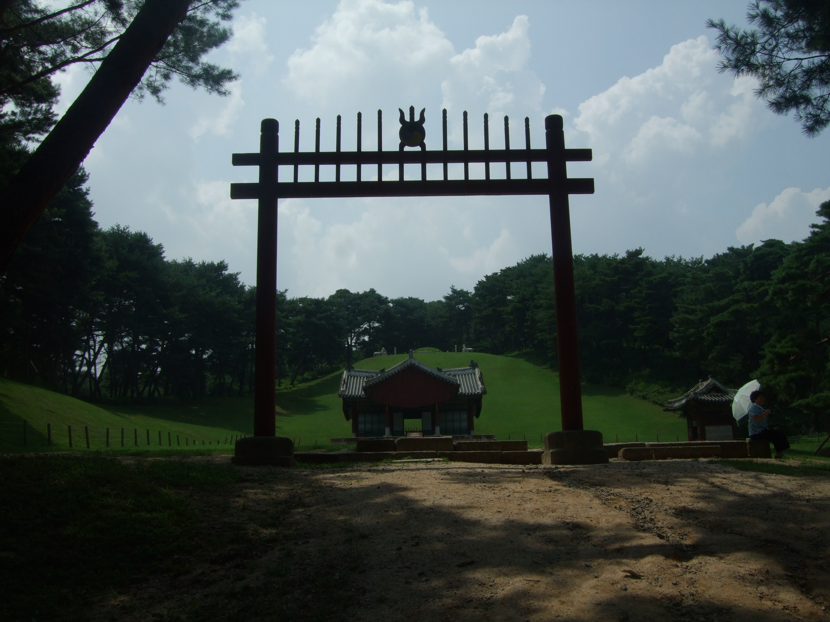 조선 경종의 정비 단의왕후의 능